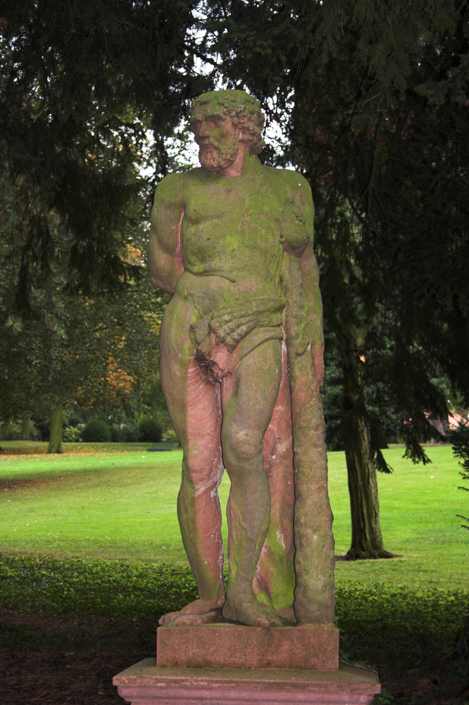 Statue des Herkules. Ehemals Lustschlosses Favorite Mainz, heute Stadtpark Mainz